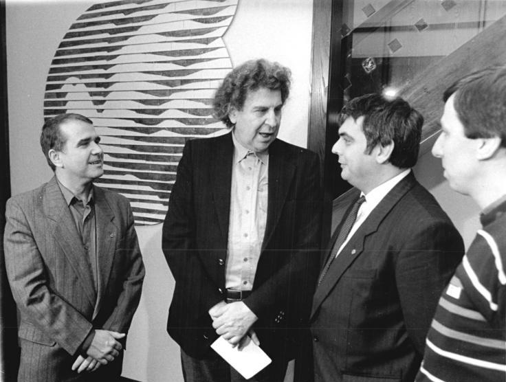 ADN-ZB-Roeske-15.1.89 Berlin: Begegnung- Der 1. Sekretär des Zentralrates der FDJ, Eberhard Aurich (l.), traf mit dem griechischen Komponisten Mikis Theodorakis (2.v.l.) zusammen. Während des Pfingsttreffens der FDJ soll das berühmte Poem "Canto General" von Pablo Neruda nach der Musik von Mikis Theodorakis als Ballett uraufgeführt werden. An der Begegnung nahmen Dr. Hartmut König (2.v.r.), Stellvertreter des Ministers für Kultur, und Philipp Dyck (r.), Sekretär des Zentralrates der FDJ, teil. Information added by Wikimedia users.